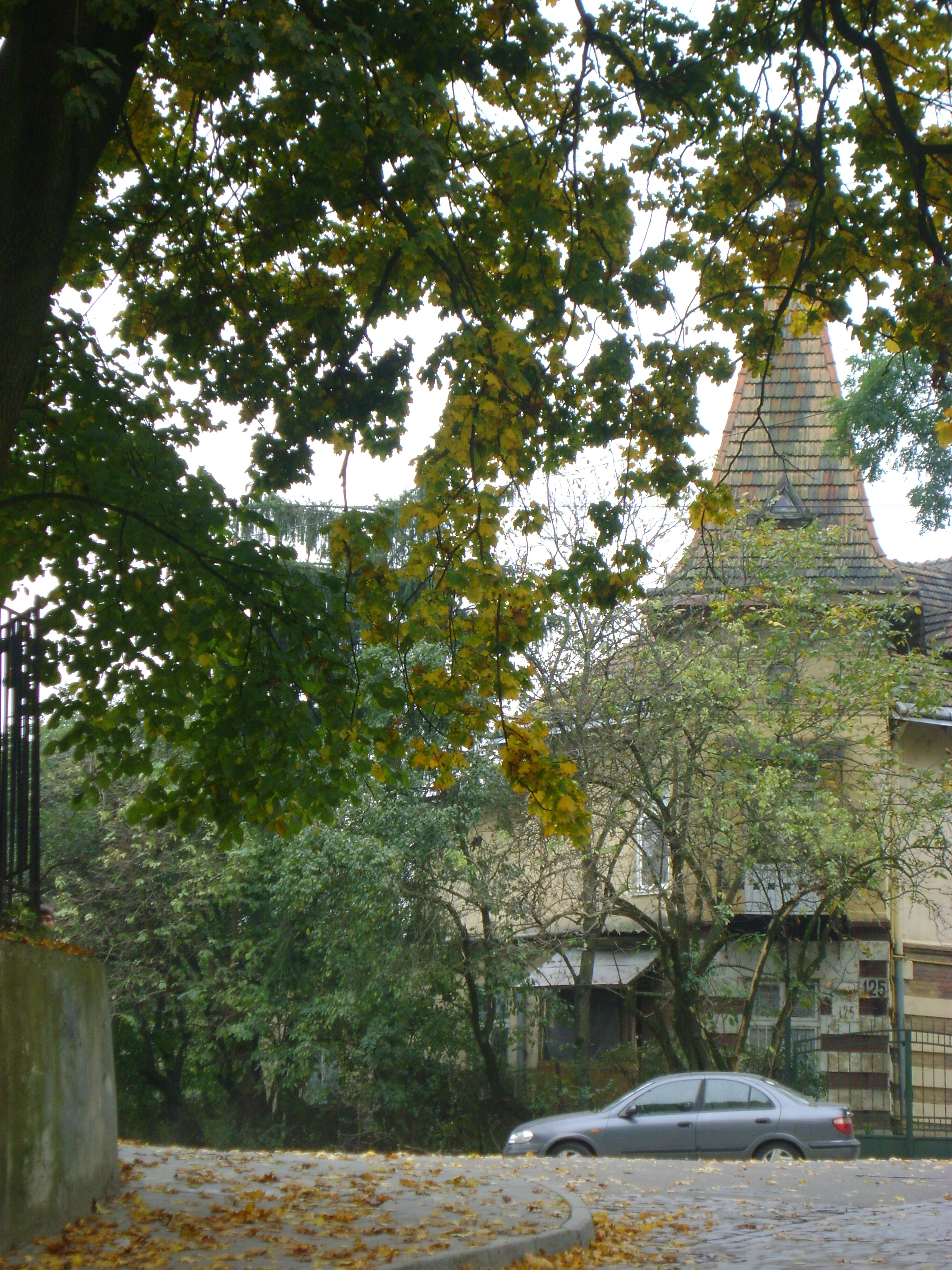 Софіївка2.jpg